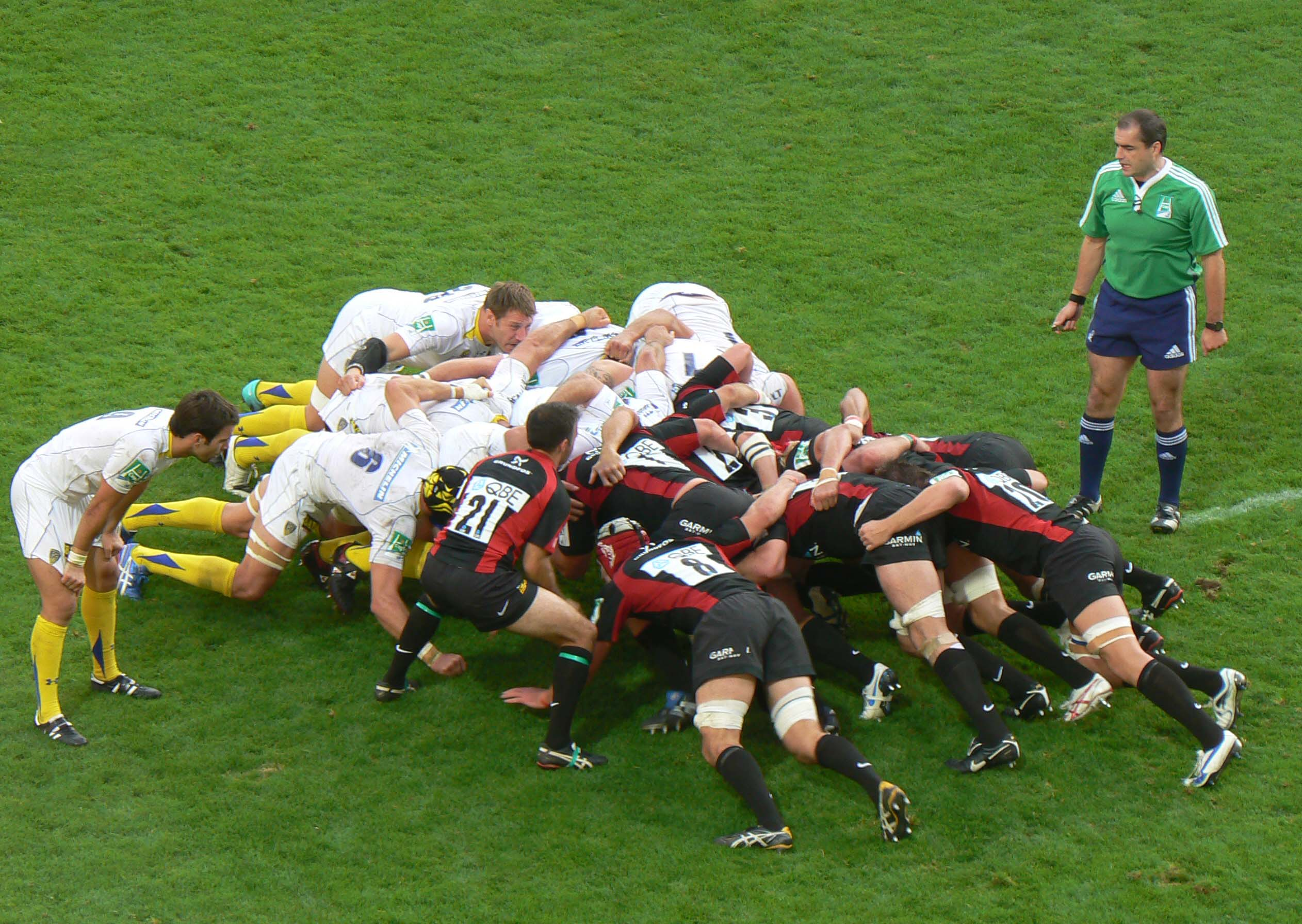 Une mêlée opposant l'ASM Clermont Auvergne aux Saracens lors de la première journée de la Coupe d'Europe 2010-2011 au stade Marcel-Michelin de Clermont-Ferrand.